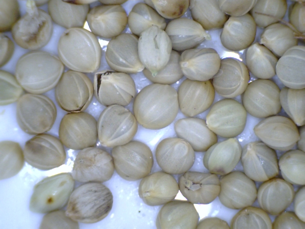 Japanhirse